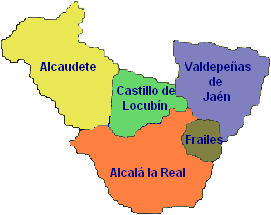 Mapa de municipios de la comarca de la Sierra Sur, en Jaén (España)